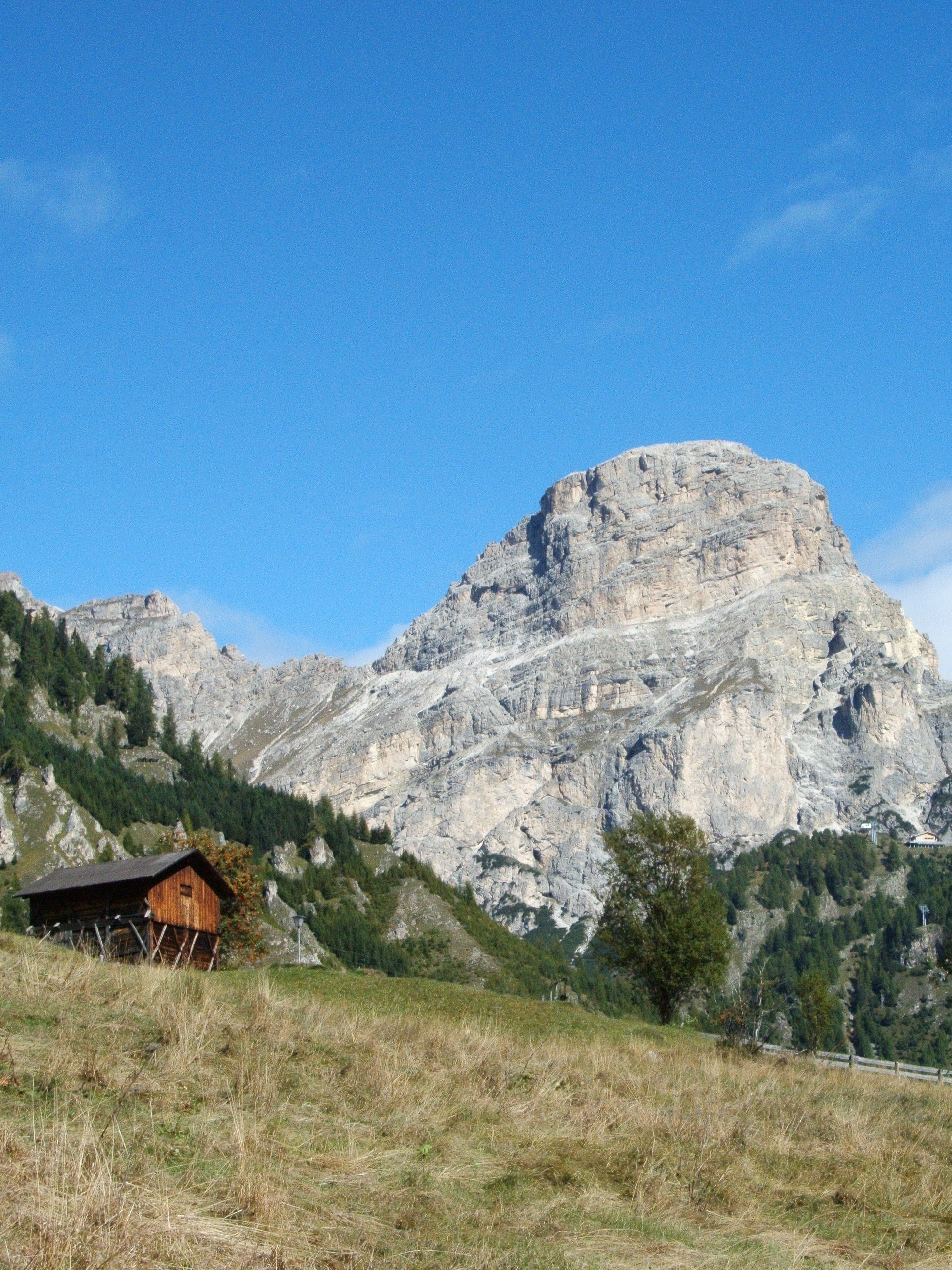 Sassongher, Monti badioti, Alto Adige, Italia.